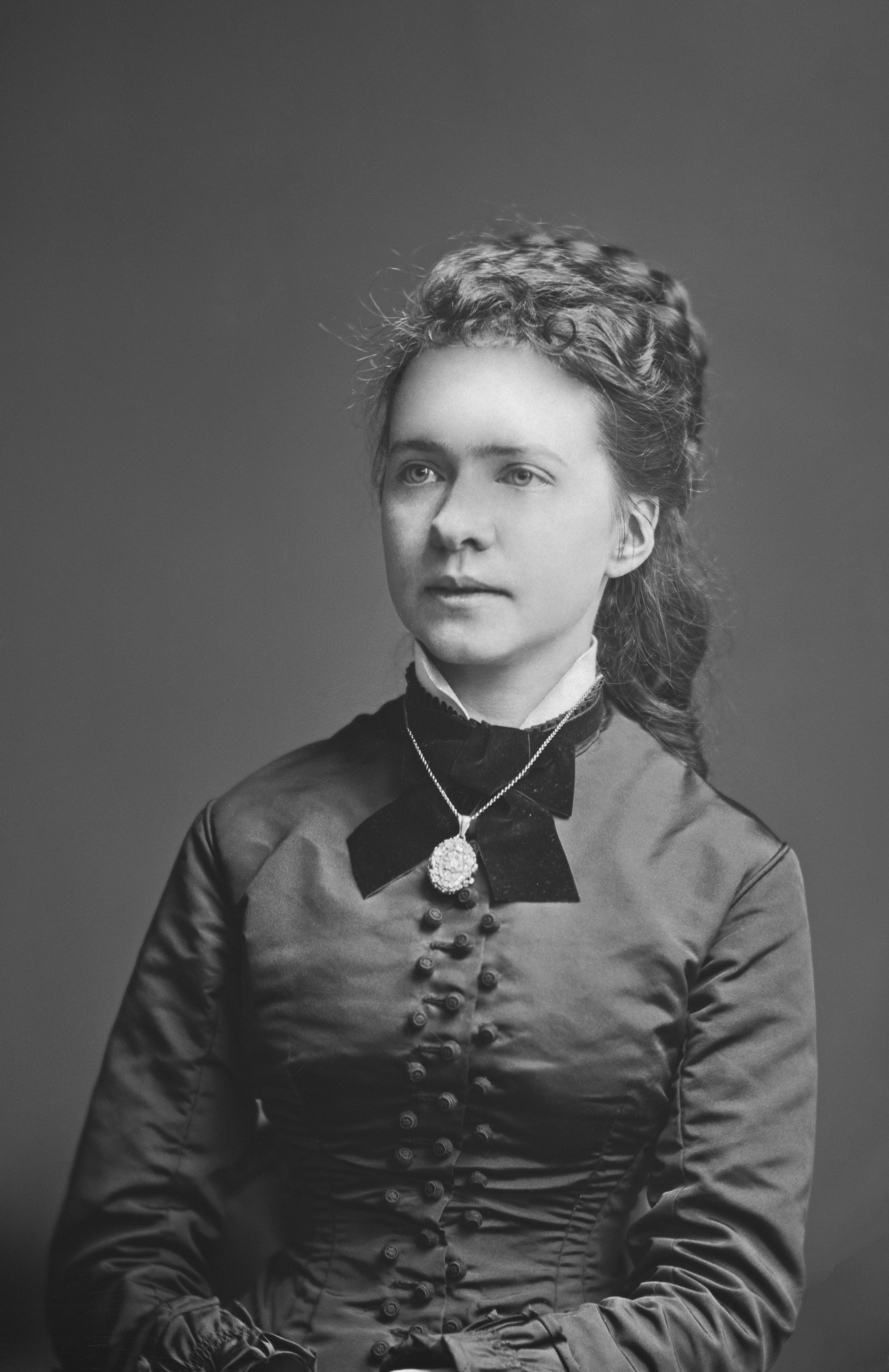 taidemaalari Alma Judén; pysty, mustavalkoinen, retusointi, retusointi korjattu digitoinnin yhteydessä